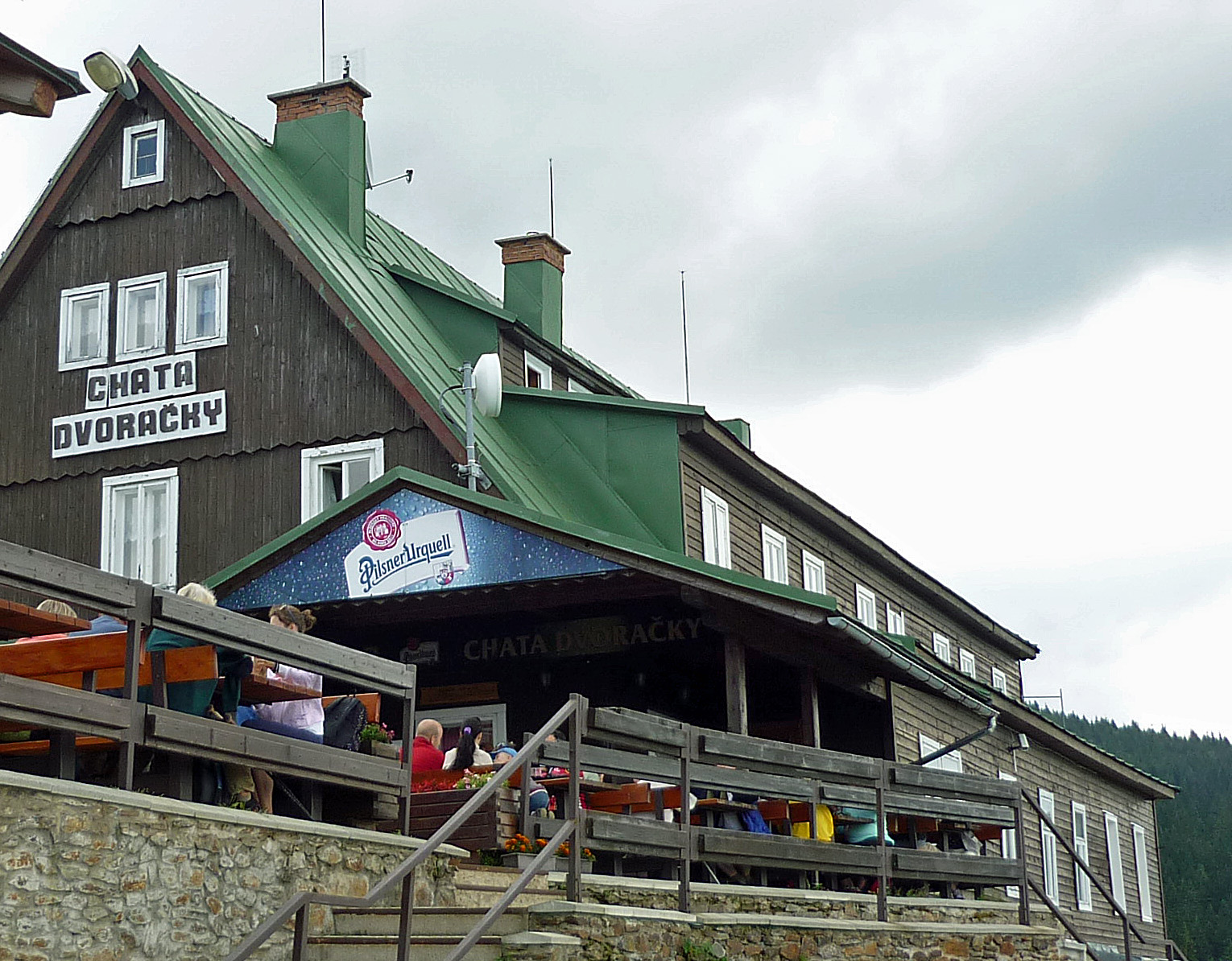 Hofbaude bei Rochlitz im Riesengebirge